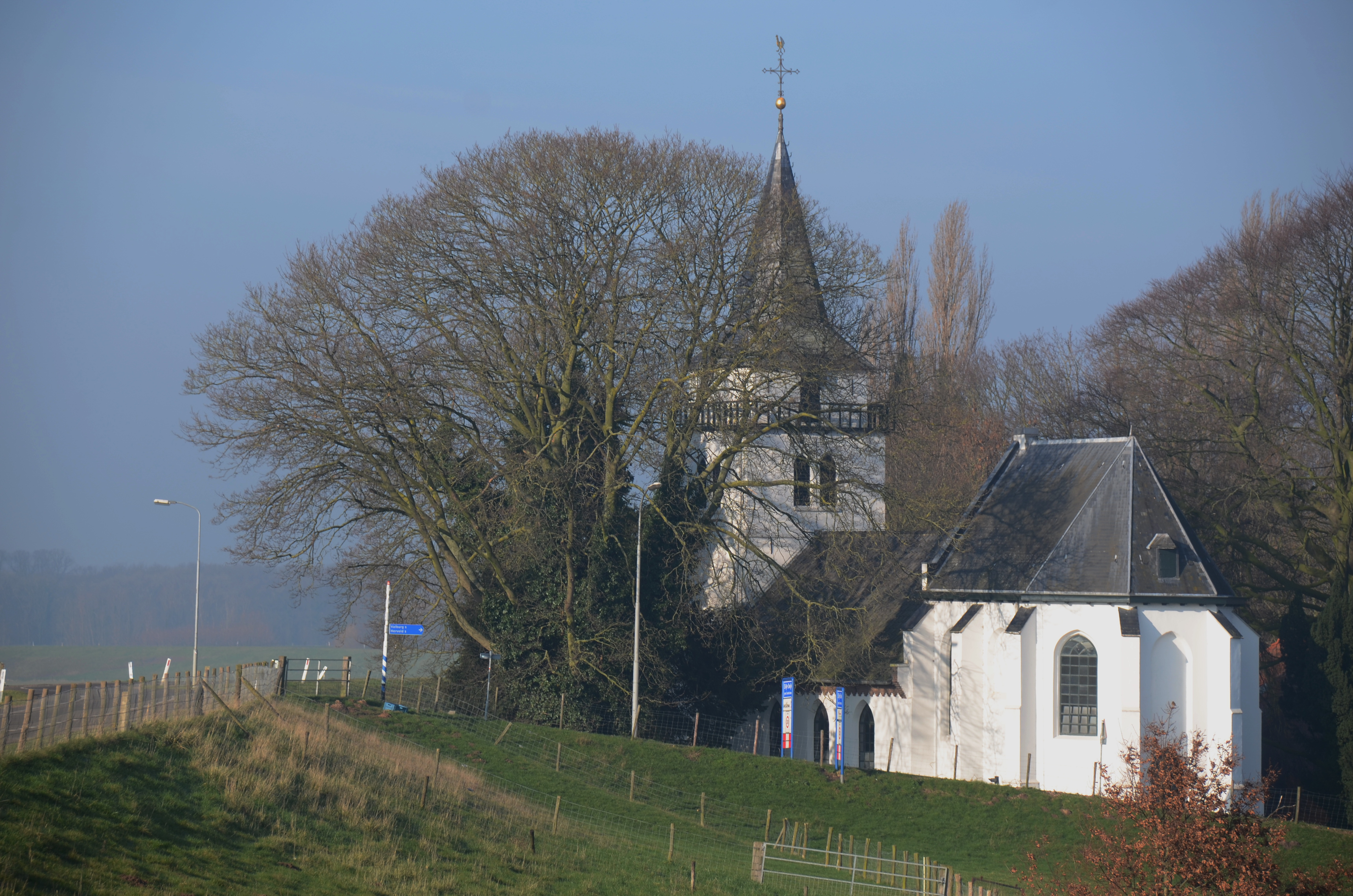 Protestant church of Slijk-Ewijk from some distance